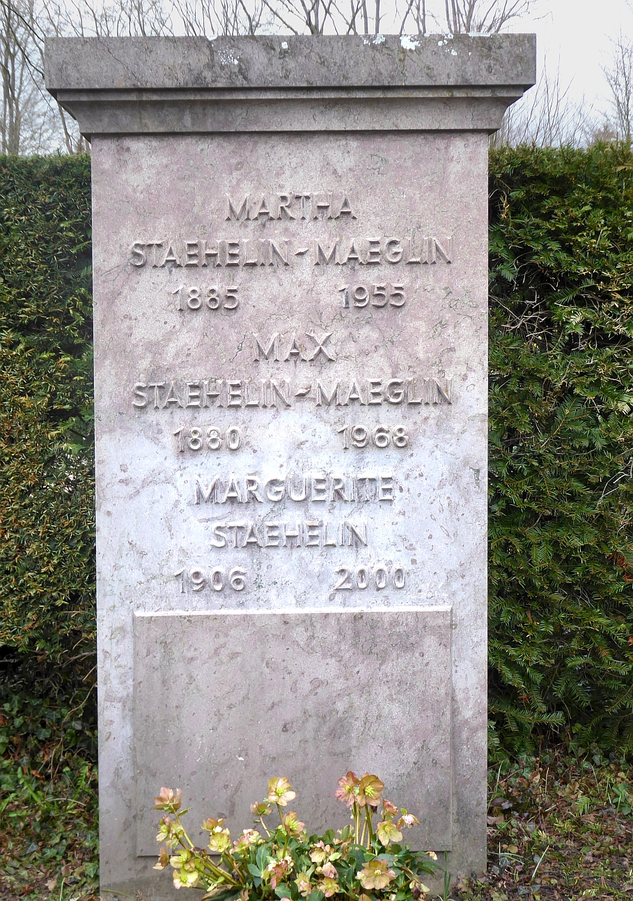 Max Staehelin-Maeglin (1880–1968) Wirtschaftsjurist, Bankier, Ciba Präsident, einer der sieben überlebenden Schweizer auf der untergegangenen Titanic, Grab auf dem Friedhof Hörnli, Riehen, Basel-Stadt